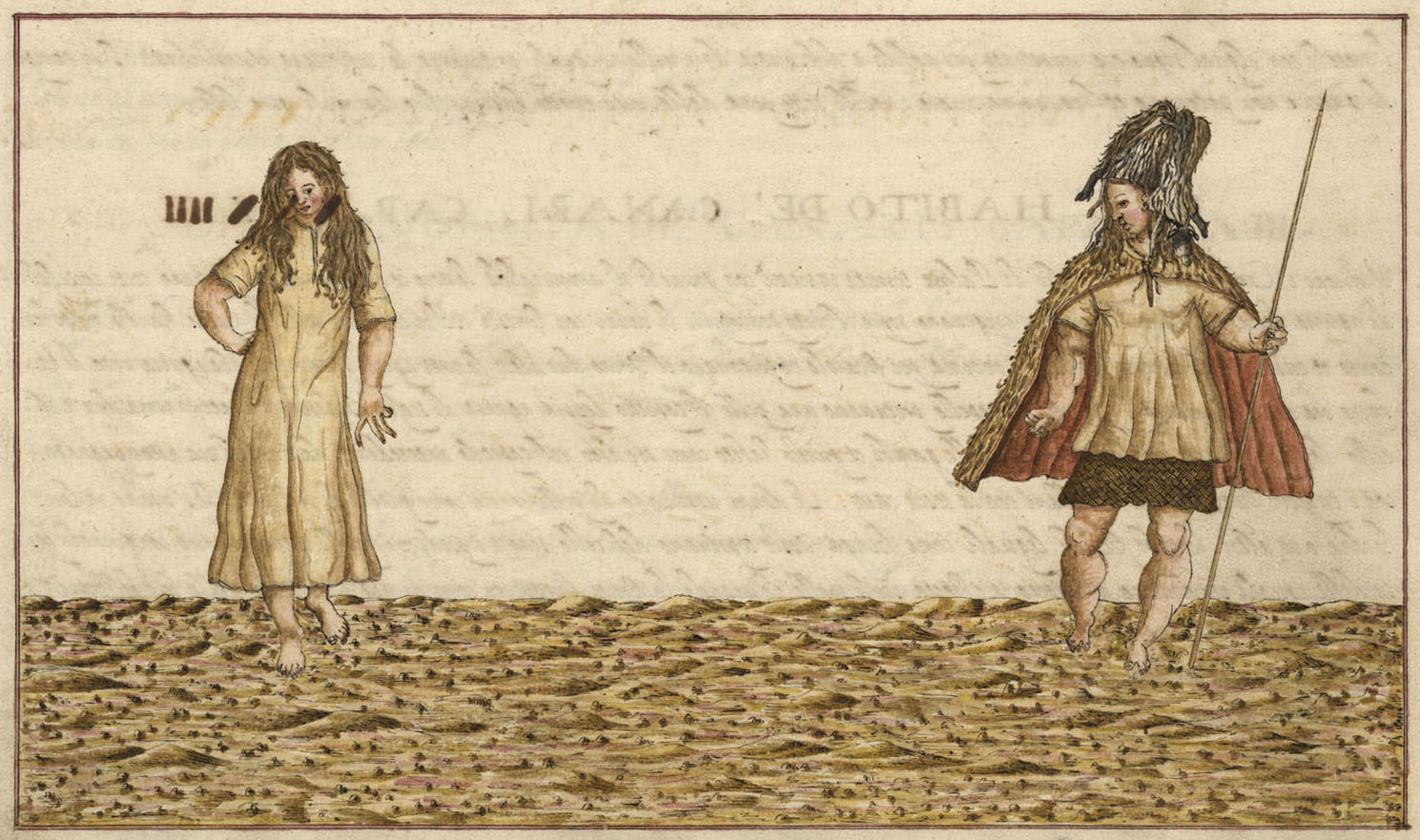 Ureinwohner der Insel Gran Canaria dargestellt Ende des 16. Jahrhunderts durch Leonardo Torriani